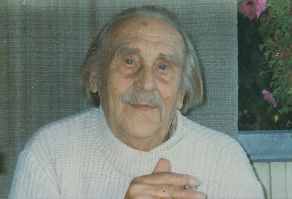 Porträt von Friedrich Popp